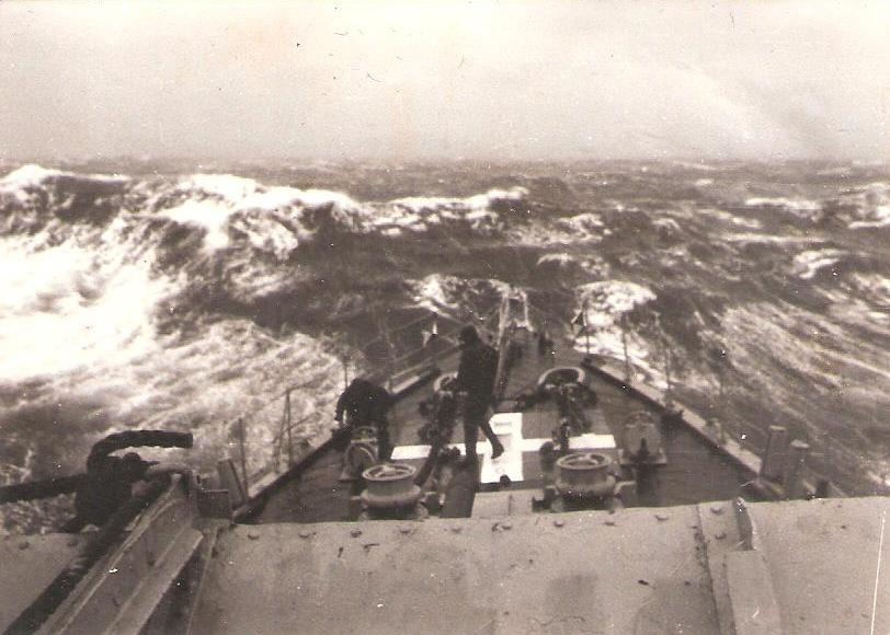 סערה בים התיכון מגשר אח"י חיפה